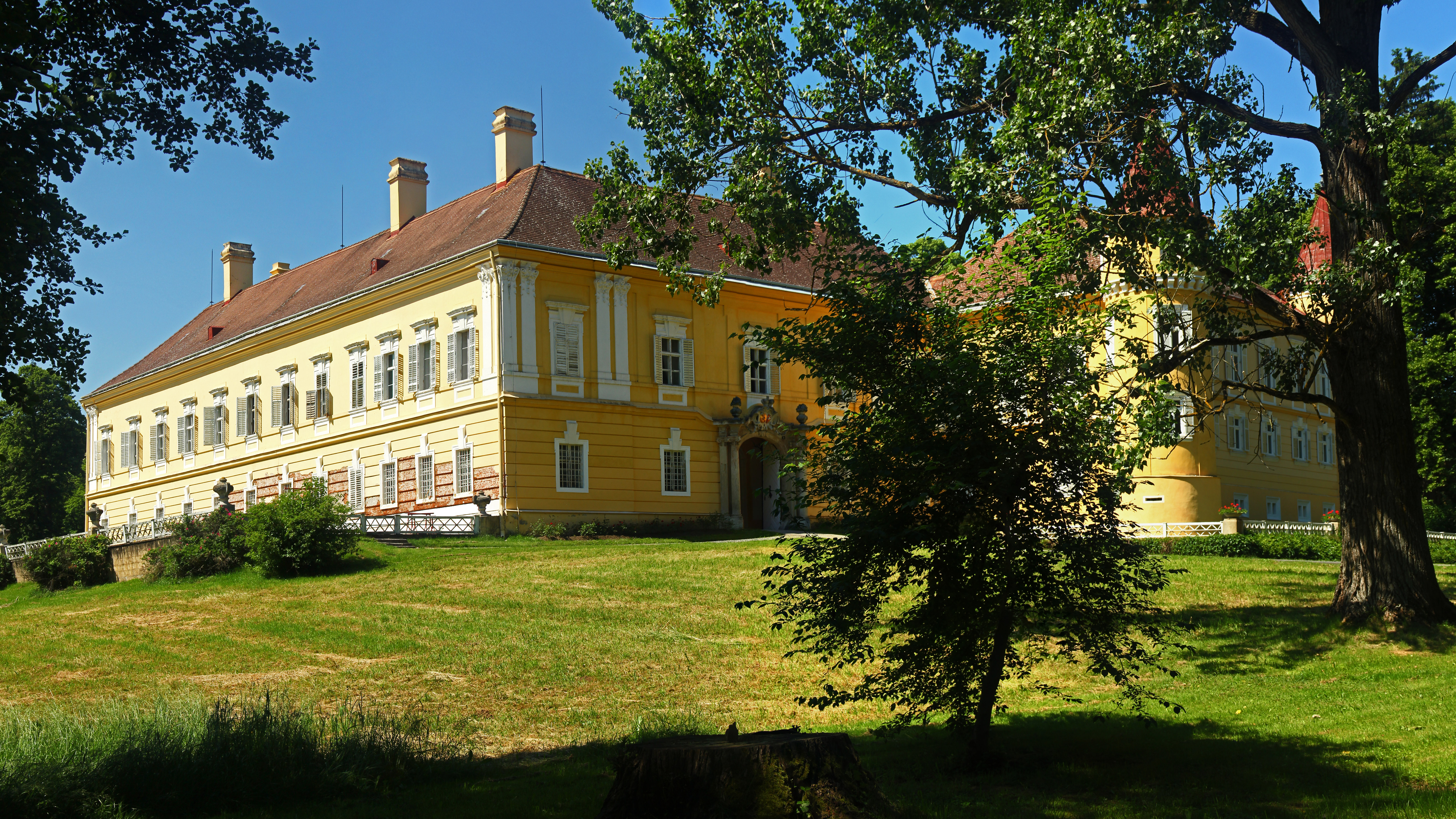 Schloss Weinern